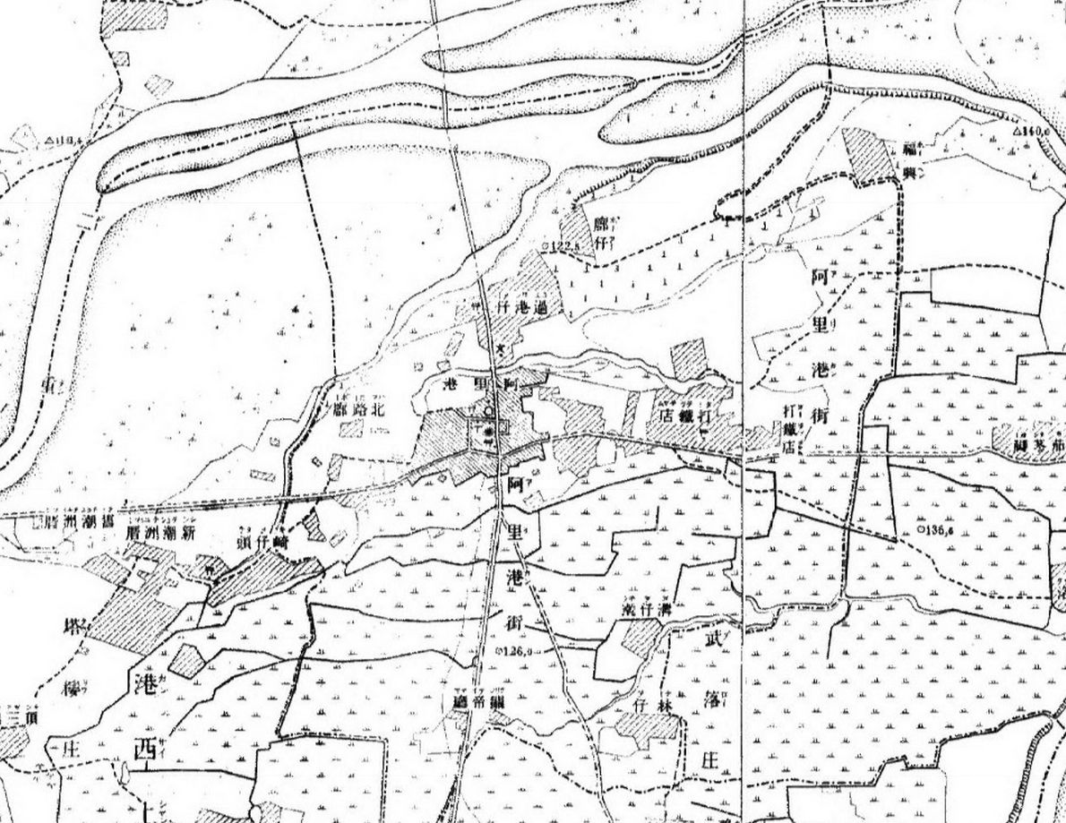 阿里港: 1898日治二萬分之一台灣堡圖